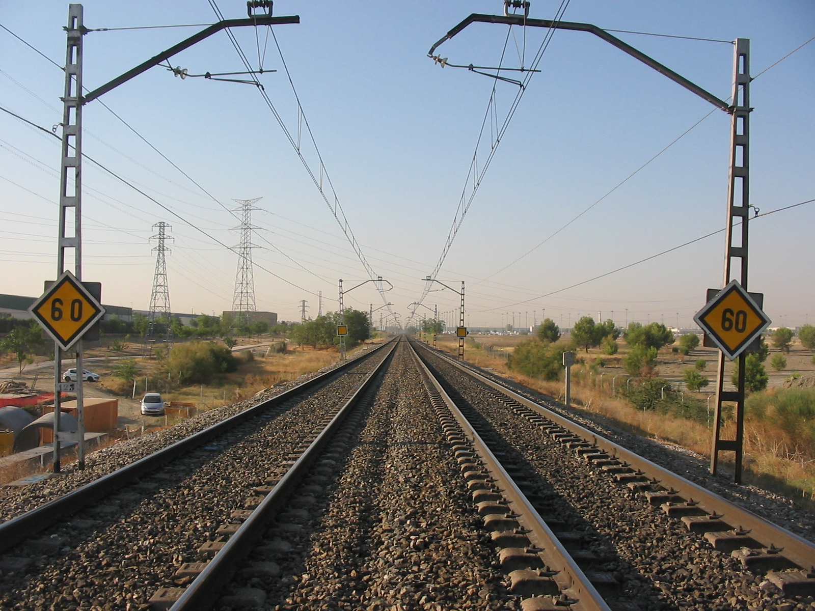 Fotografía de Pablo Alberto Salguero Quiles